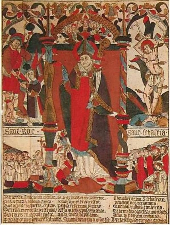 St. Lizier (Lycerius) von Couserans mit St. Rochus, St. Sebastian und anderen Heiligen, Pilgerbild, 15. Jahrhundert